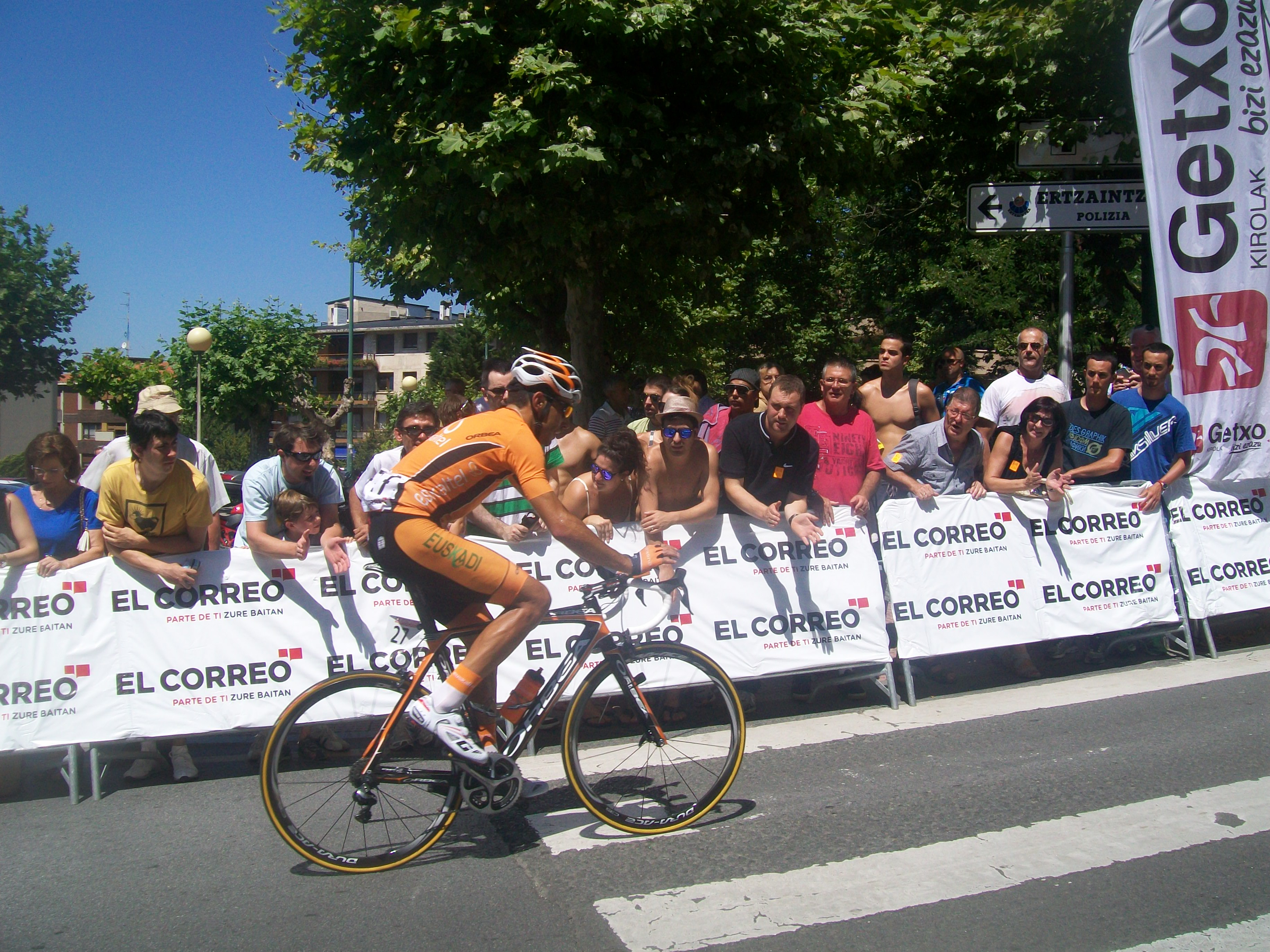 Sprint en el Circuito de Getxo 2013